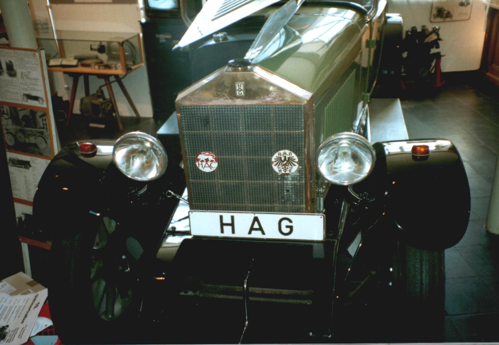 HAG 1926